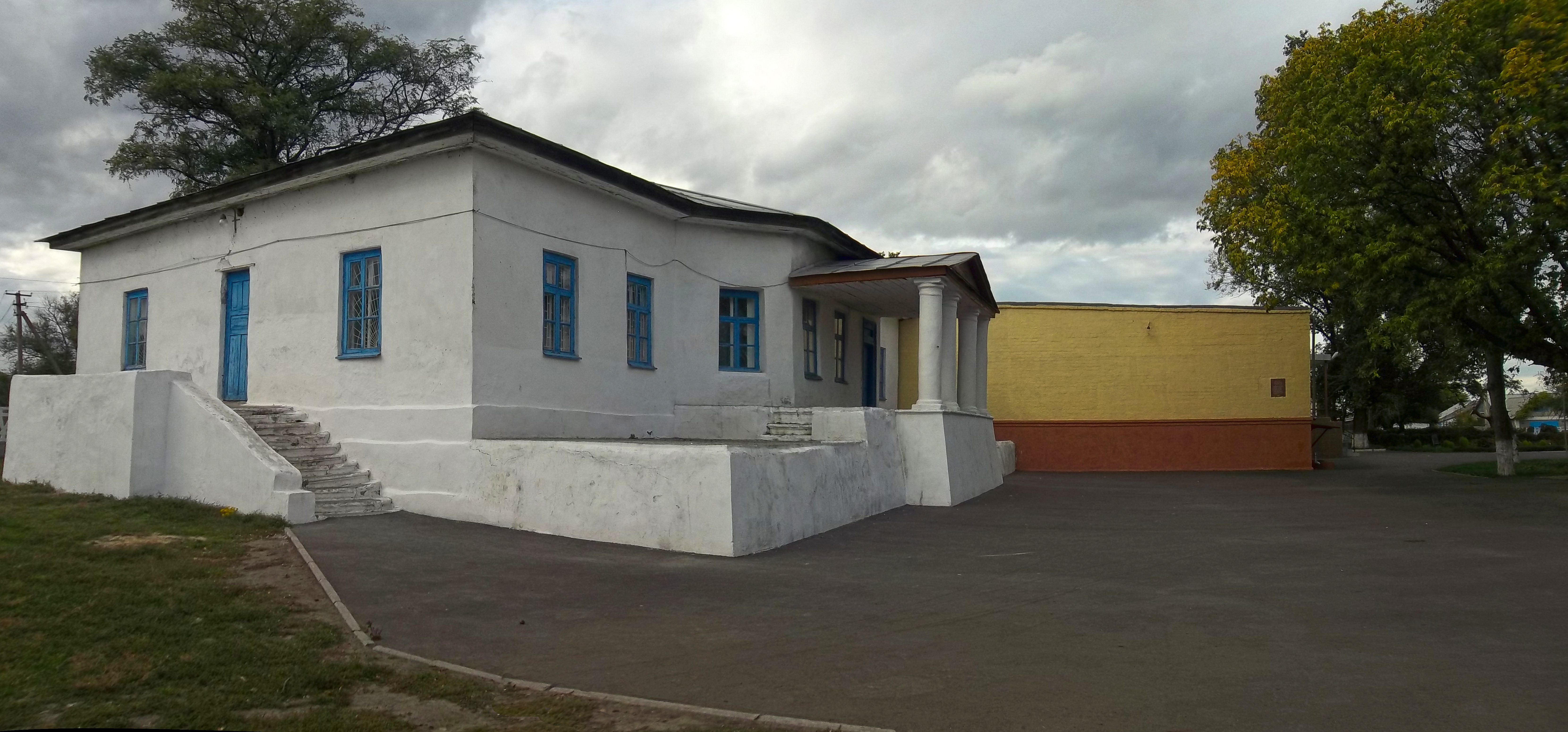 Будинок /маєток/ родини Добровольських, Кривий Ріг, село Зелене, вул. Червонофлотська, 1 (вул. Яновського), школа №101.